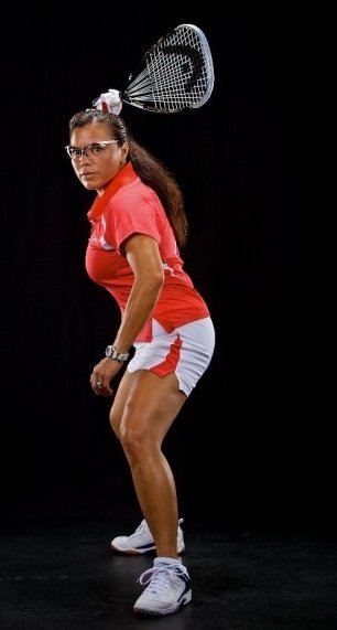 Jackie Paraiso